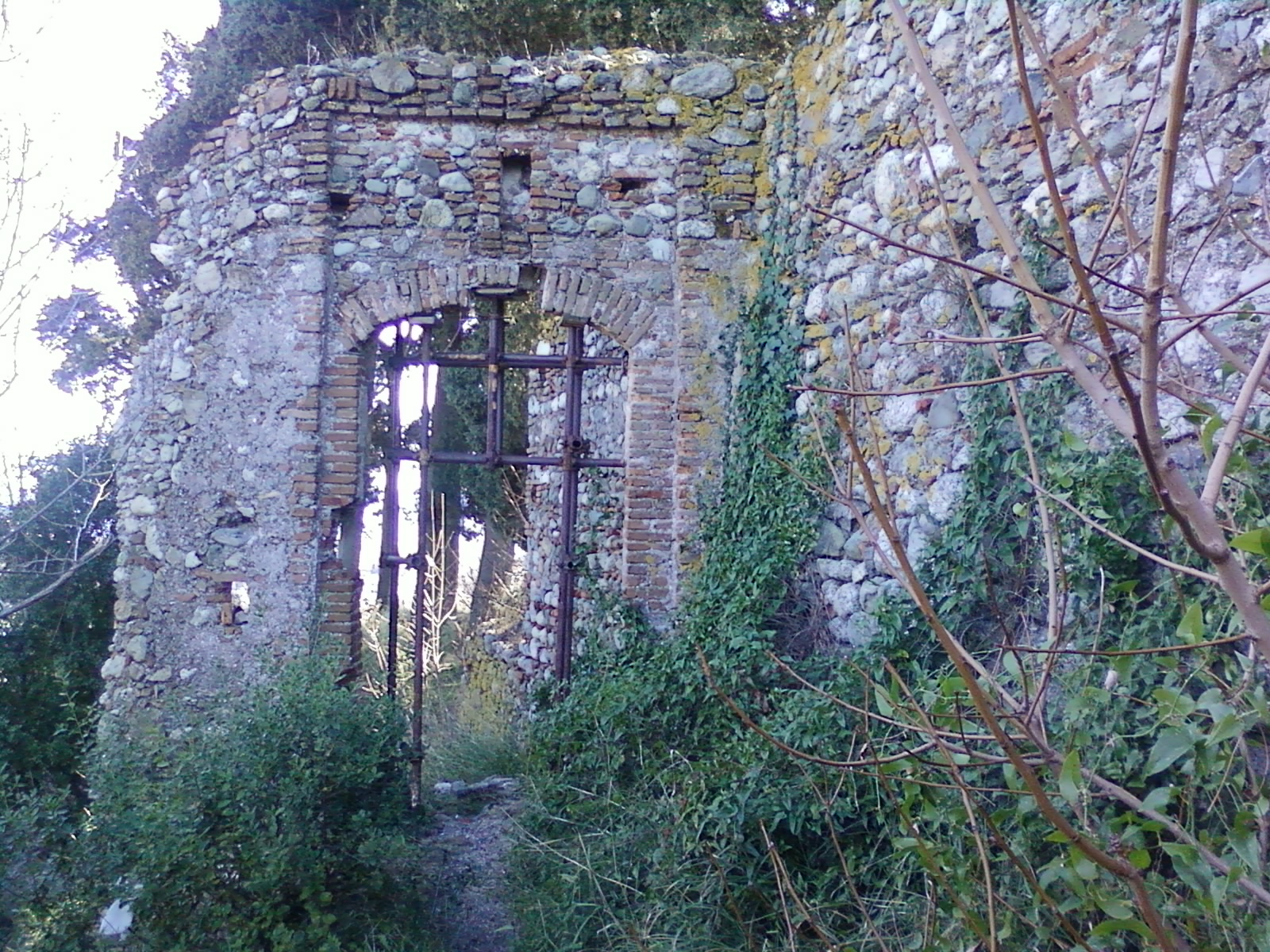 Ingresso del castellaro di Albisola Superiore SV (Italy)